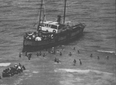 אוניית המעפילים הפורצים